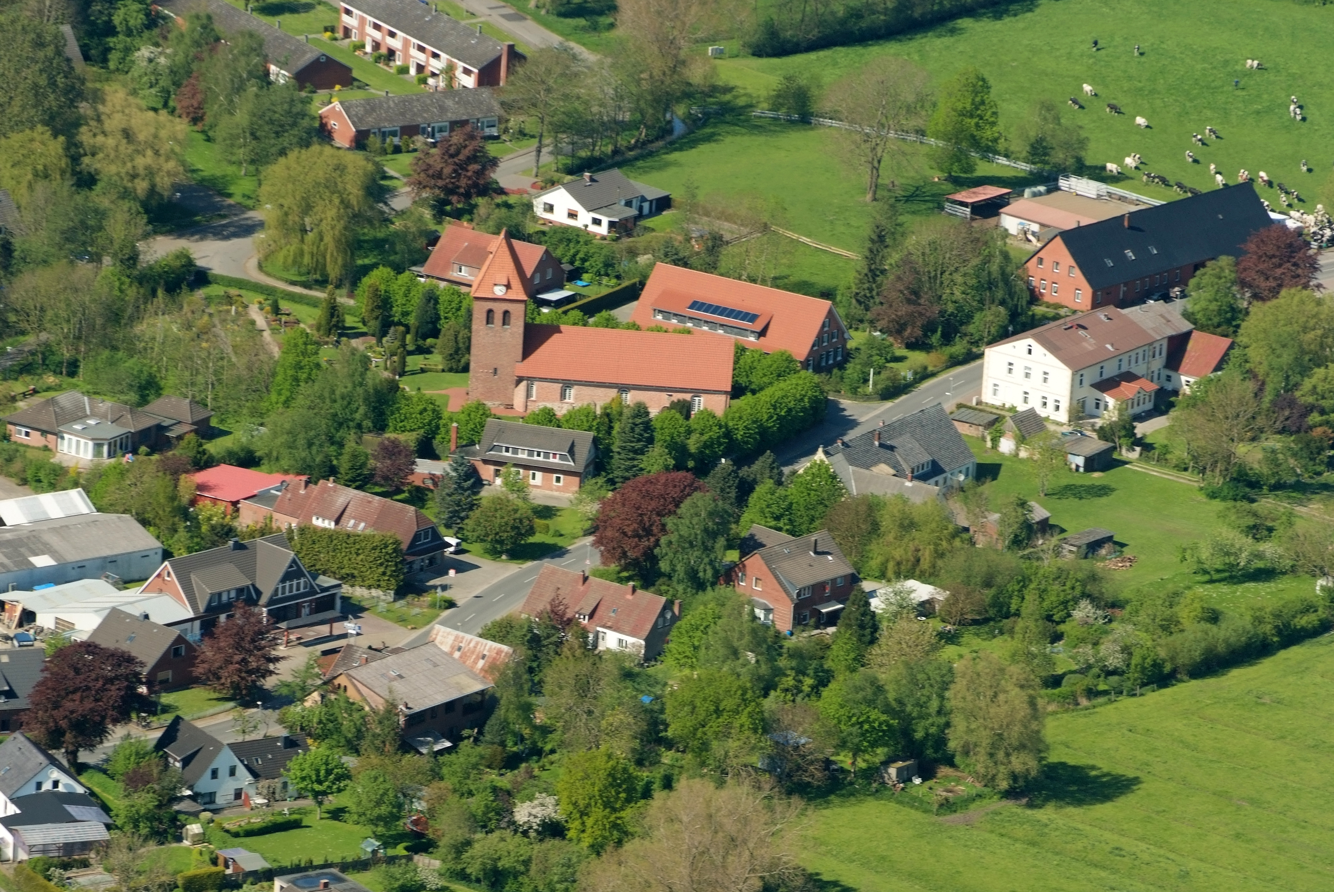 St. Georg-Kirche in Spieka (Nordholz), Kennziffer 35.204.000.003 GKS Gruppendenkmal Wurster Straße 100, 27637 Nordholz-Spieka Fotoflug vom Flugplatz Nordholz-Spieka über Bremerhaven, Wilhelmshaven und die Ostfriesischen Inseln bis Borkum